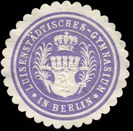 Sealing stamp Title: Luisenstädtisches - Gymnasium in Berlin Description: violett, weiß, geprägt Place: Berlin size: 4 cm